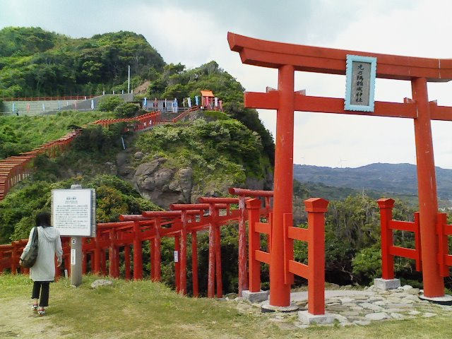 山口県長門市油谷津黄にある元乃隅稲成神社